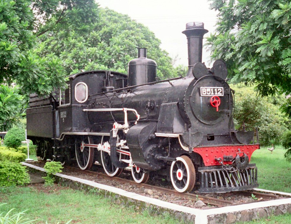 Ambarawa spoorweg museum - Locomotief